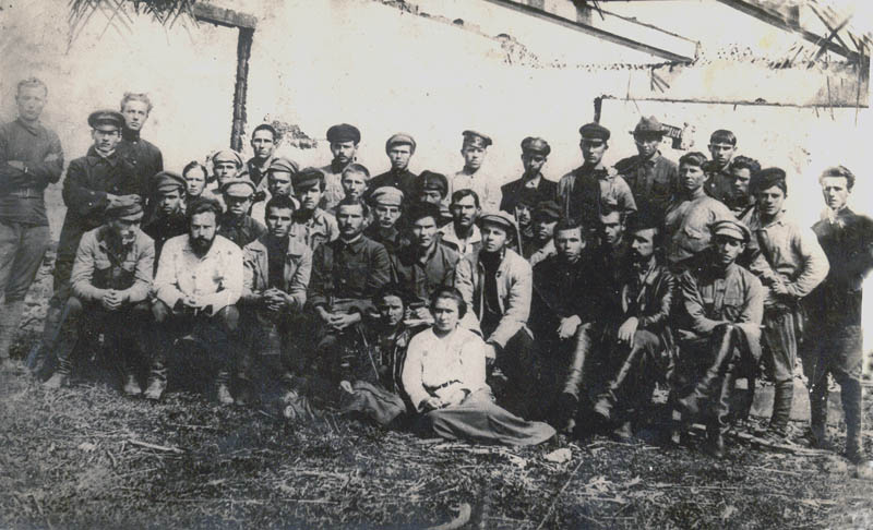 Фотография съезда комсомола Приморья в 1921 году. В центре Председатель бюро РКСМ Константин Антонов (товарищ Антон)